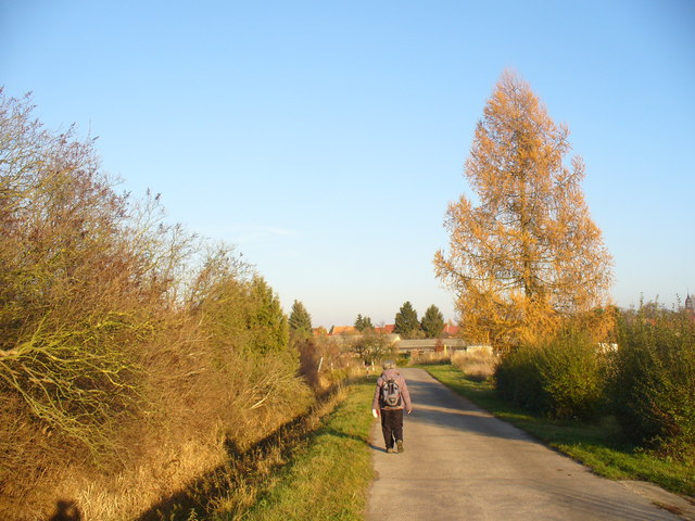 Jueterbog - Feldweg bei Gut Waldau (Path by Waldau Manor)